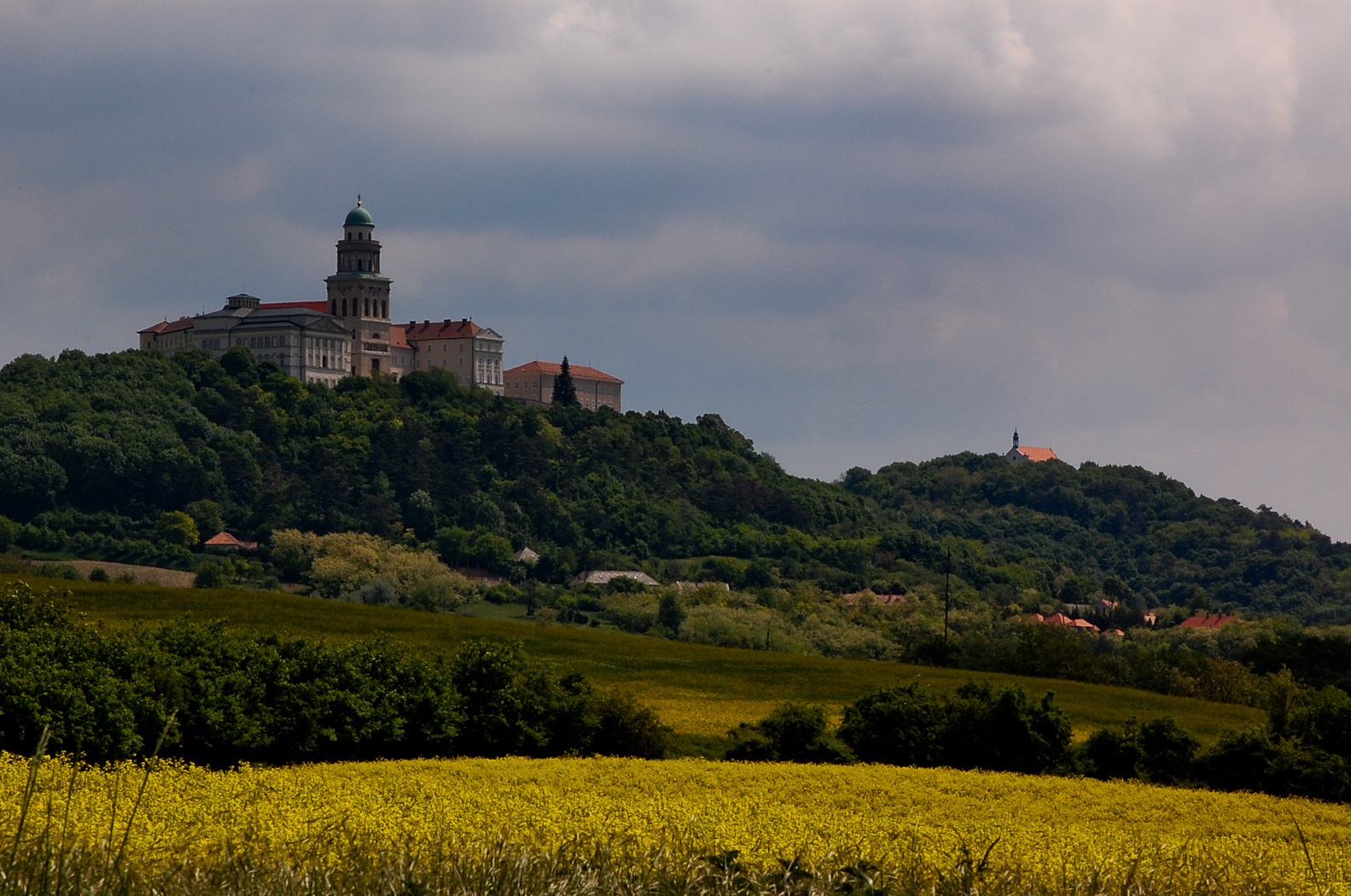 Bencés főapátsági templom (Pannonhalma, Várkerület 1 .) This is a photo of a monument in Hungary. Identifier: 4640